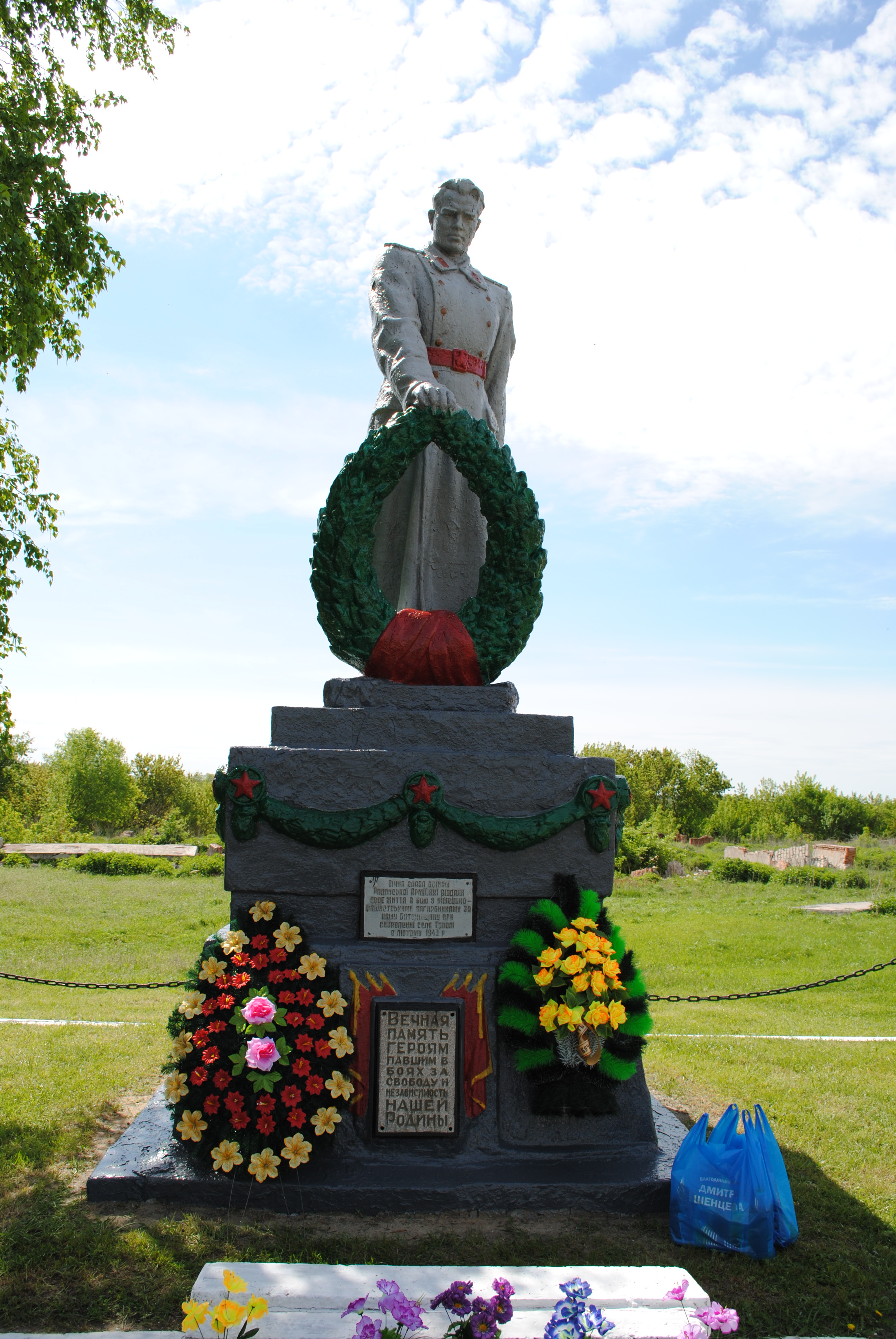 Братська могила радянських воїнів. Поховано 6 воїнів., Тополі (село)